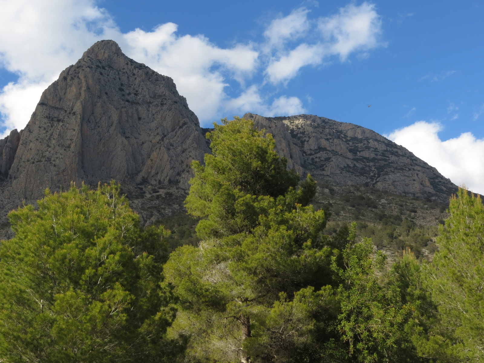 Puig Campana desde la Font del Molí